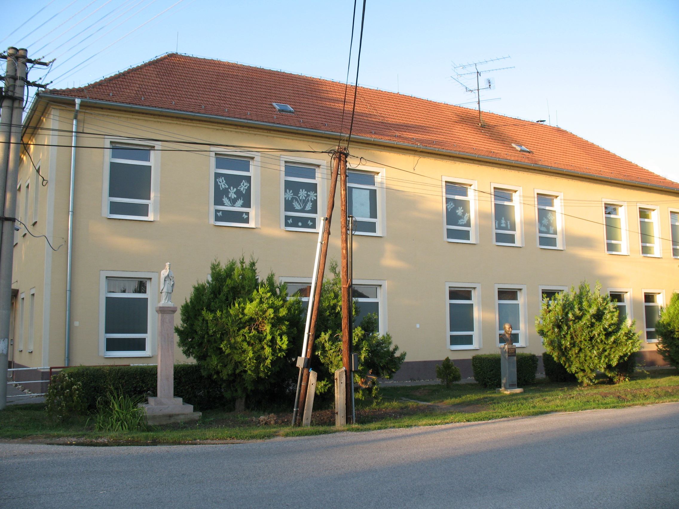 Vágkirályfa iskola